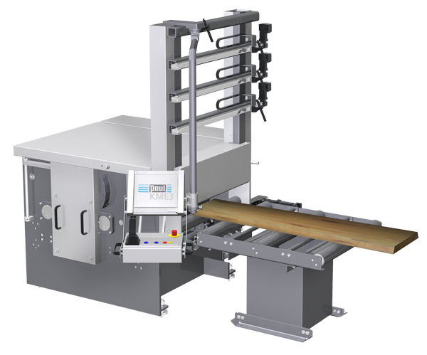 Moderner Doppelsäumer